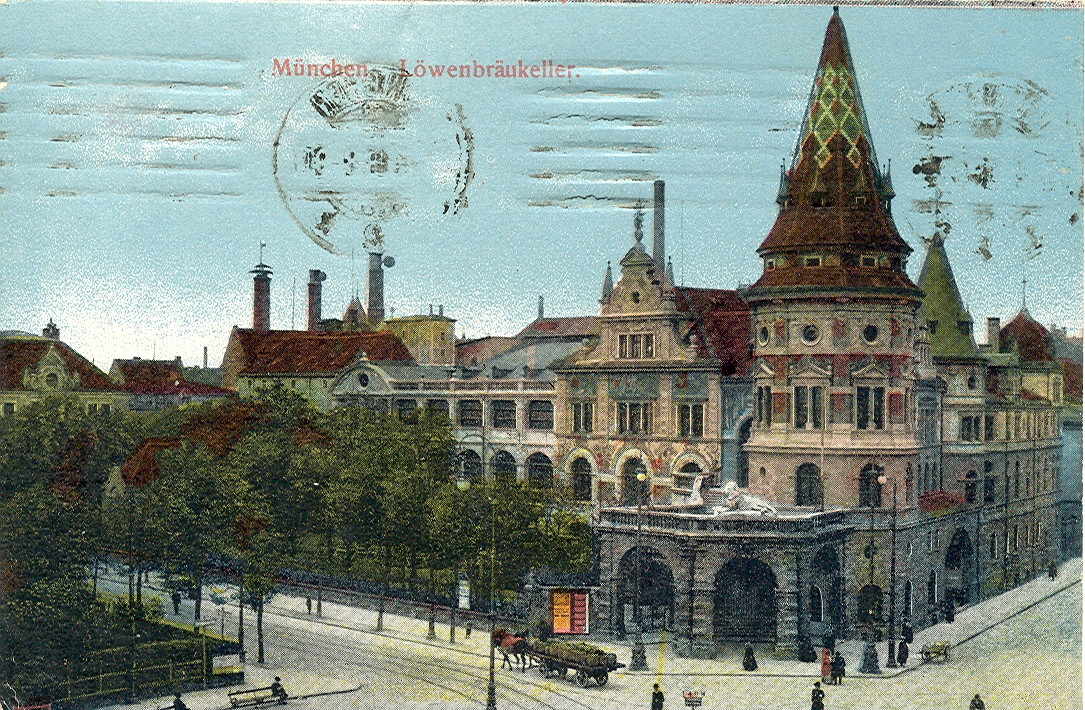 Postkarte, datiert 21.4.1918. Beschriftung: "München - Löwenbräukeller".